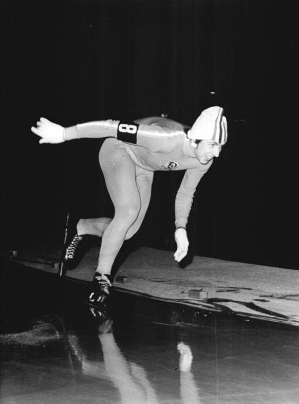 Michael Brychcy ADN-ZB Mittelstädt 29.12.71 Berlin: DDR-Einzelmeisterschaften im Eisschnellaufen auf der 400-m-Kunsteisbahn im Sportforum am 28.12.71 Neuer Titelträger über 500-m der Männer wurde Michael Brychcy vom SC Dynamo Berlin in 41,9 s. Abgebildete Personen: Brychcy, Michael: Eiskunstläufer, DDR